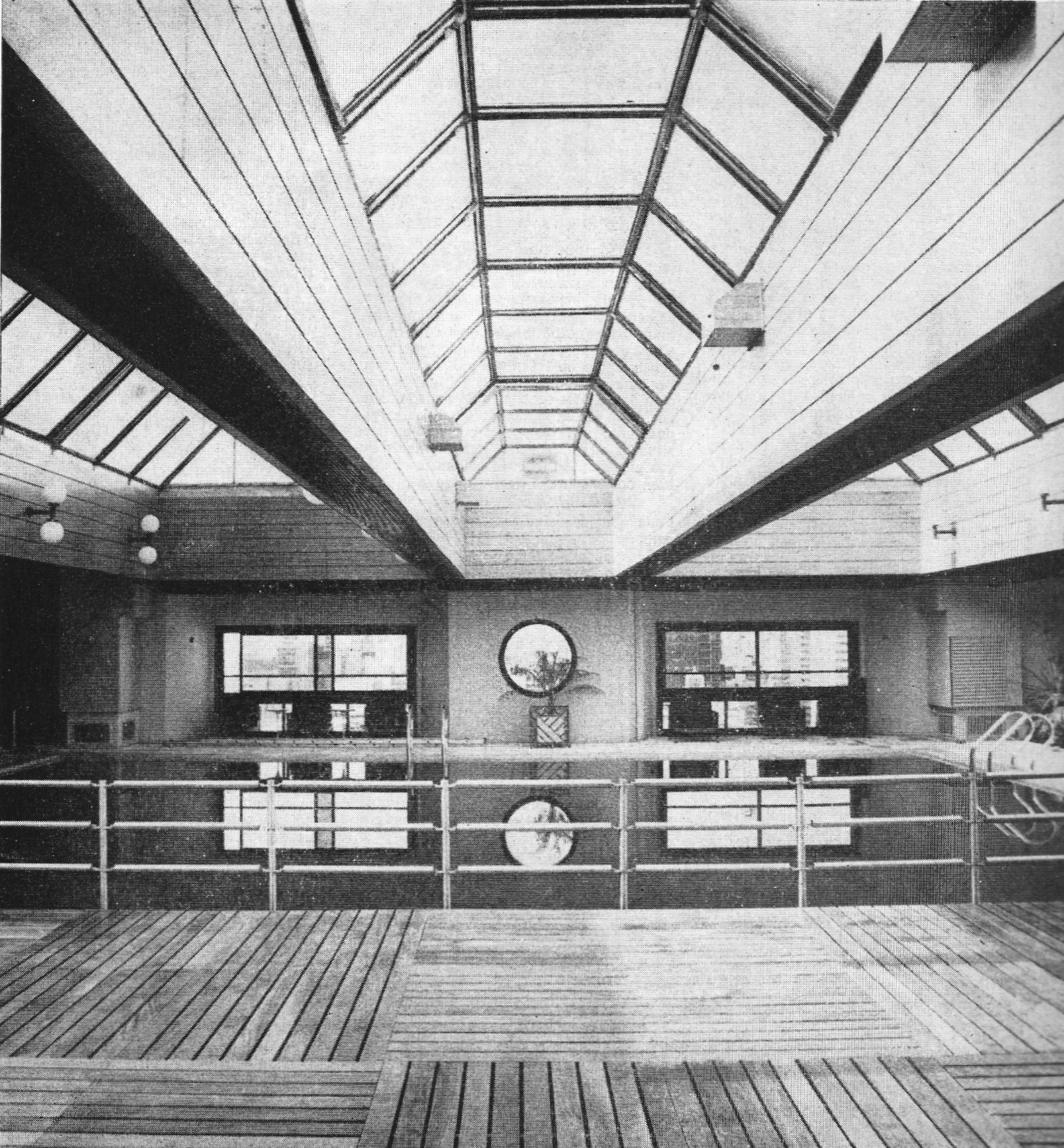 Piscina en el piso 22 del Hotel Libertador de Buenos Aires, inaugurado en 1977. Actualmente Sheraton Libertador Hotel. Arquitectos: SEPRA